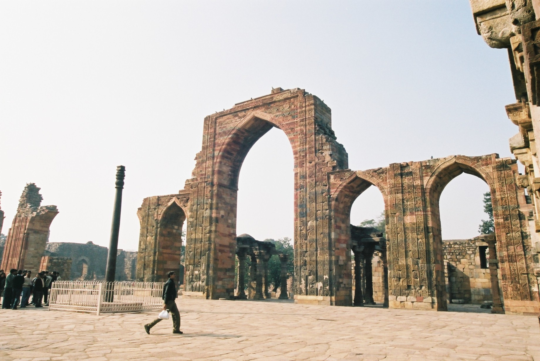 クワットゥル・イスラーム・モスクの中庭にある鉄柱。(画面左) 純度はほぼ100%で、4世紀のグプタ朝時代に造られたのに錆びていない不思議な鉄柱です。 (2005/01/28 Delhi, INDIA) /* UNESCO World Heritage */ Delhi, Qutub Minar and its Monuments (1993) 世界遺産「デリーのクトゥブ・ミーナールとその建造物群」